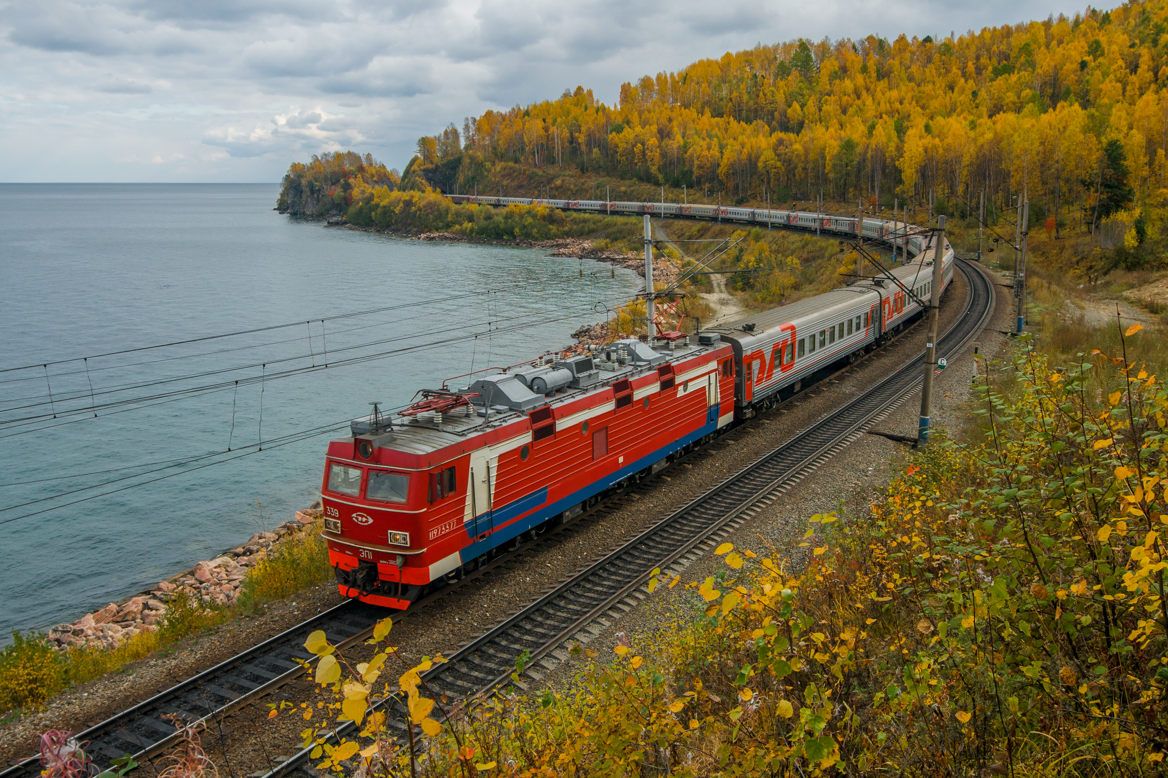 Слюдянка: Слюдянский район, Иркутская область This image is related to the protected area of Russia number 3810359